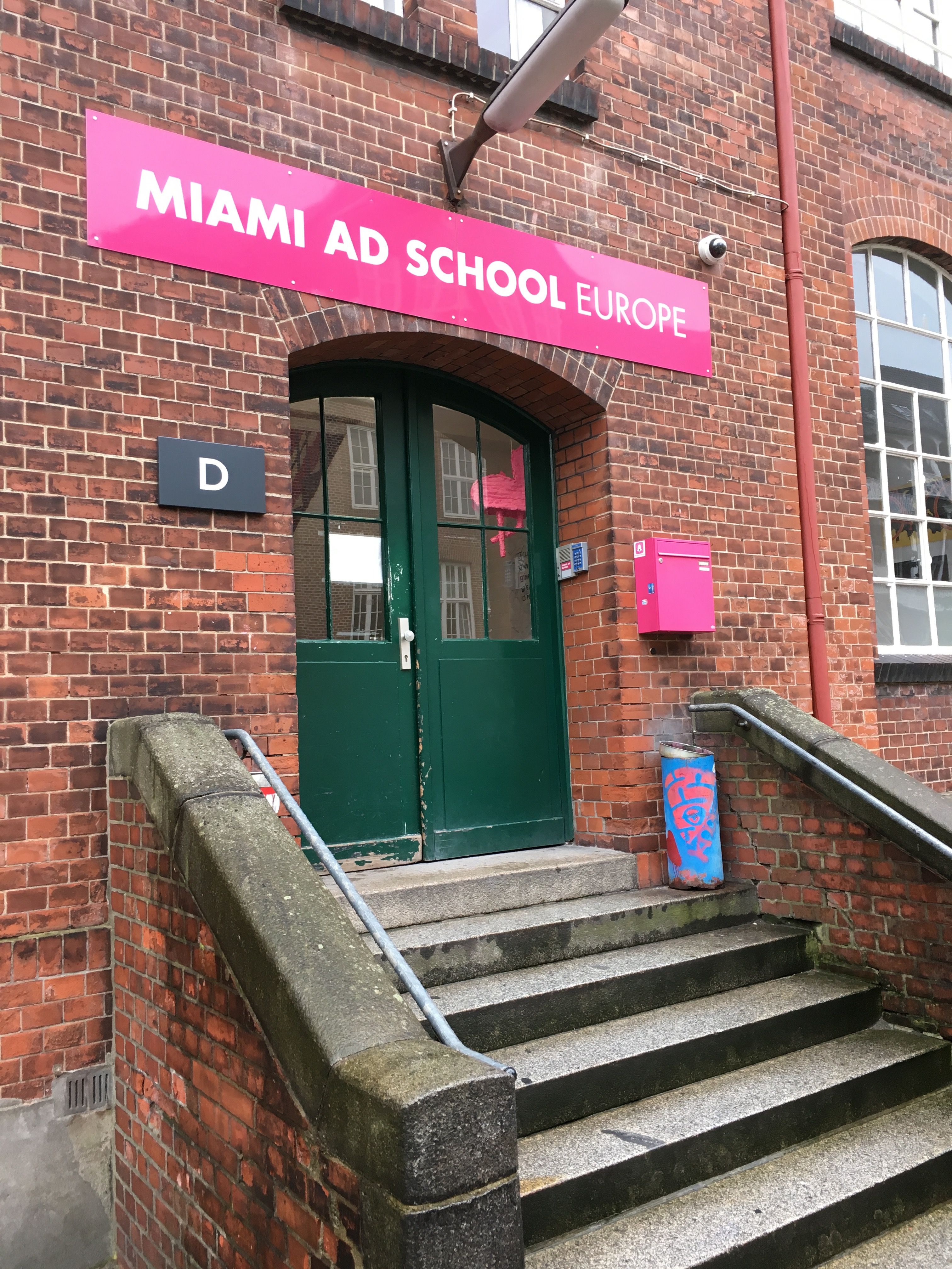 Eingang der Miami Ad School